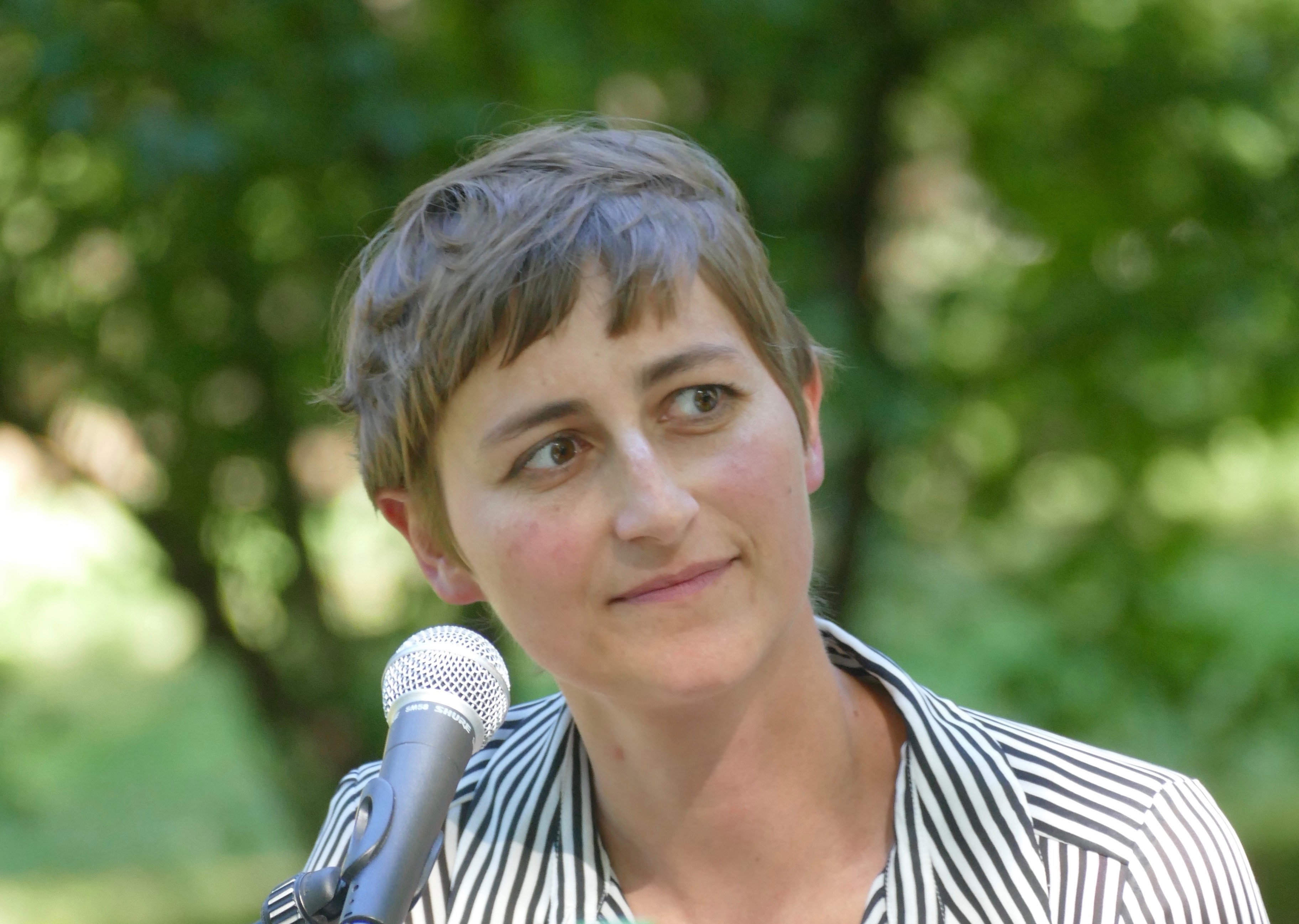 Ulrike Almut Sandig stellt auf dem Erlanger Poetenfest 2016 ihren Gedichtband "ich bin ein Feld voller Raps verstecke die Rehe und leuchte wie dreizehn Ölgemälde übereinandergelegt" vor.